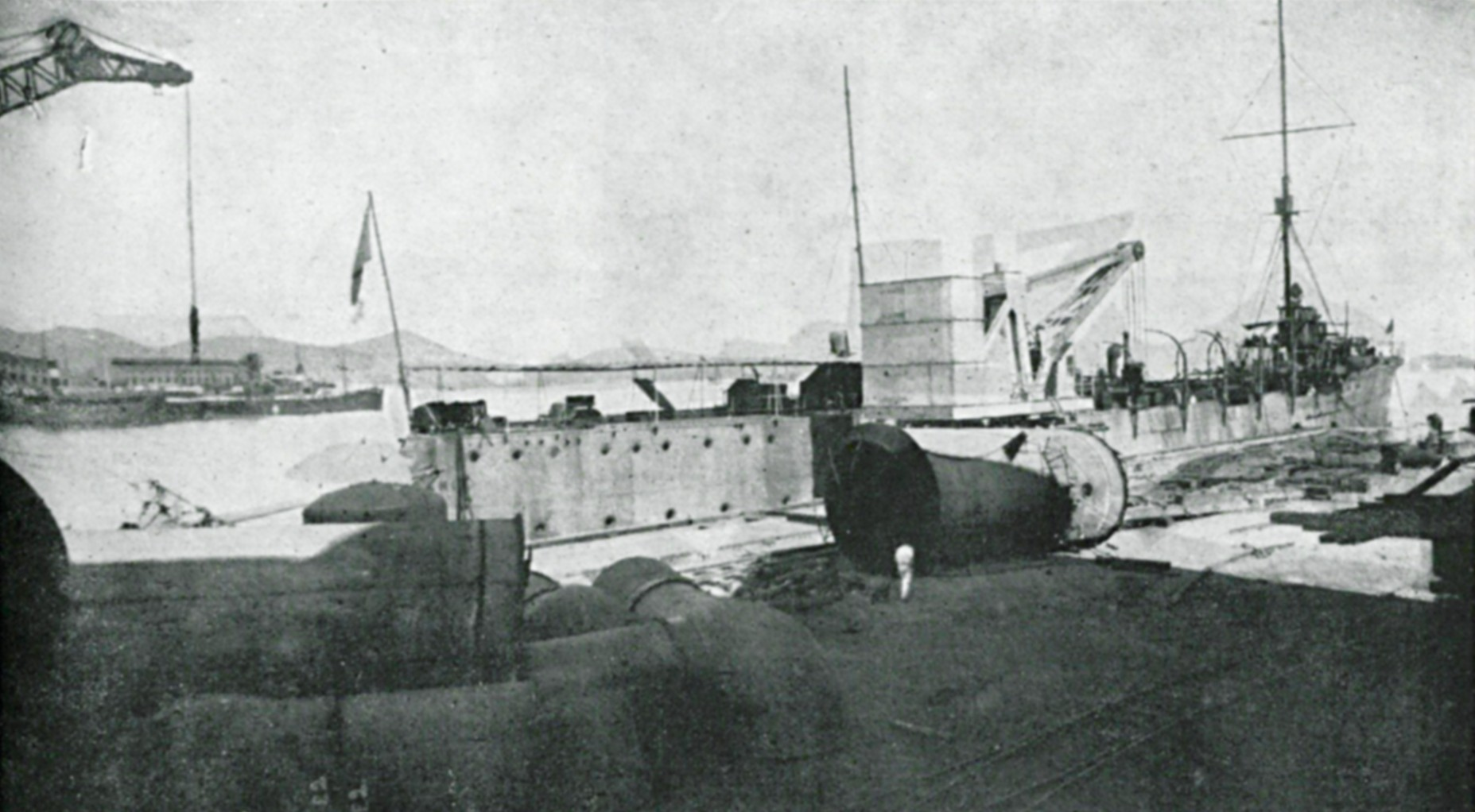 Legenda original: "Na Ilha do Vianna: O cruzador "Bahia" de nossa Marinha de Guerra, atracado no cáes daquella ilha, onde está para sofrer reparos."